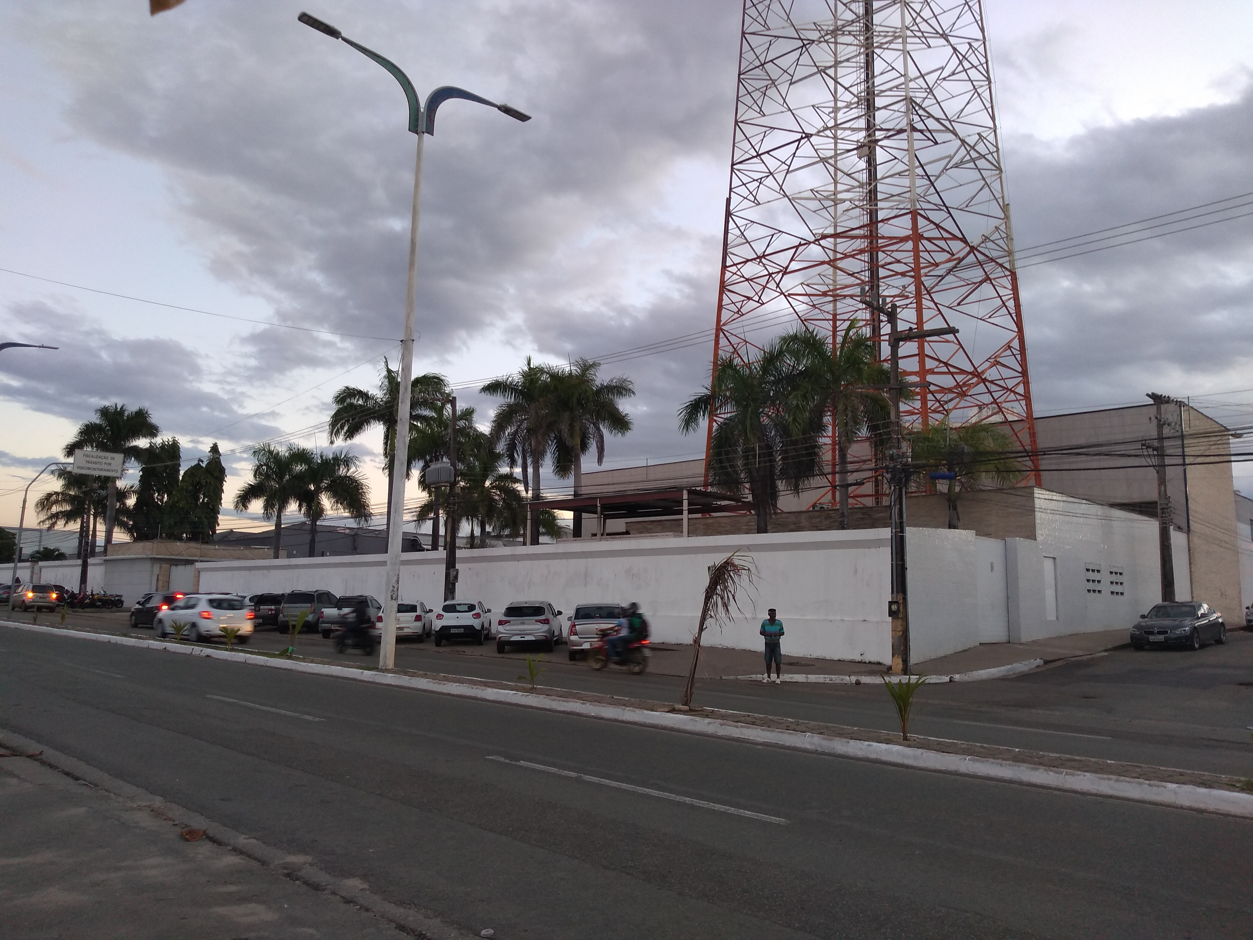 Sede do Grupo Mirante, grupo de comunicação sediado em São Luís, MA - Brasil